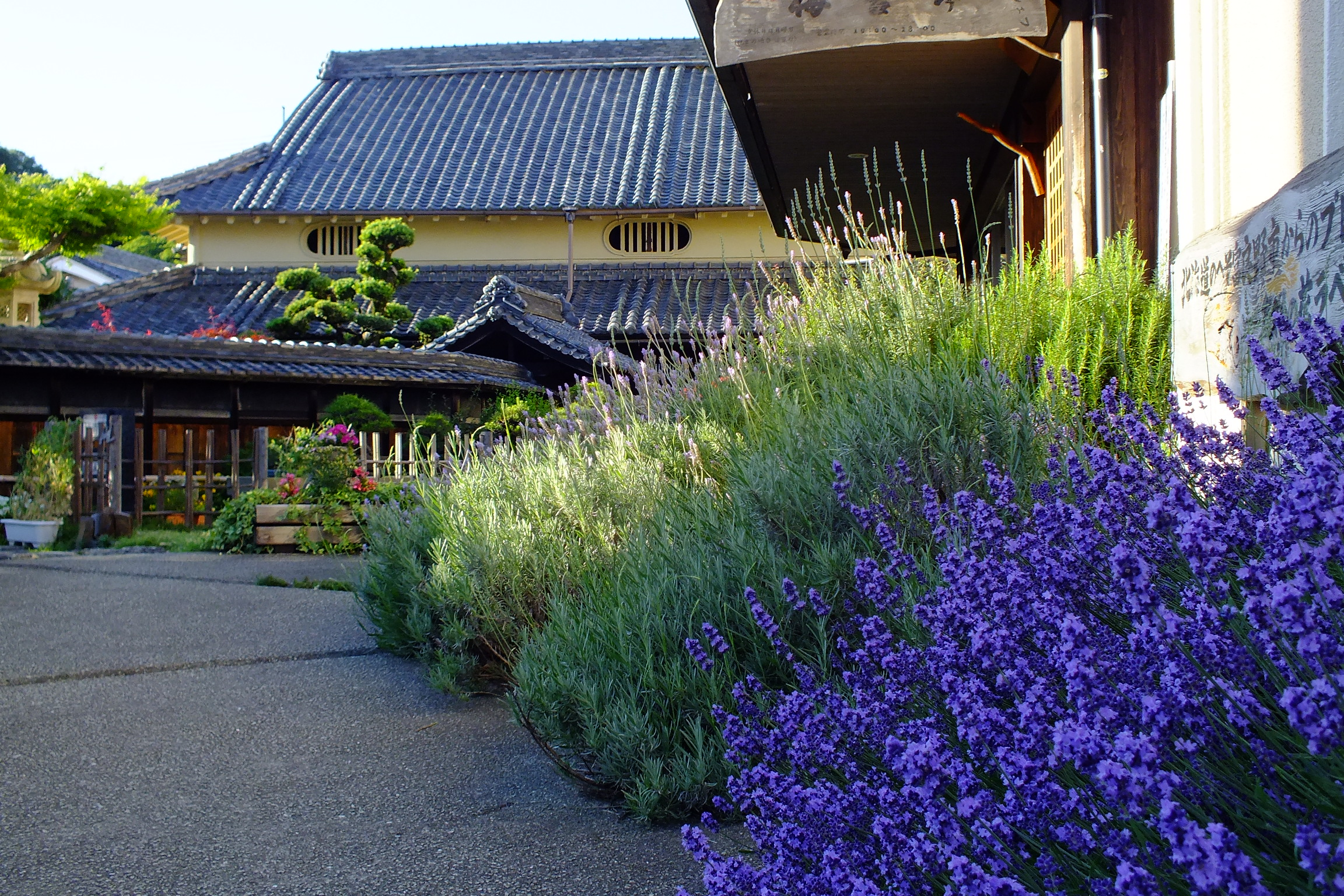 Old Kishi-House Nishiwaki,Hyogo,Japan 旧来住家住宅（来住梅吉旧邸）